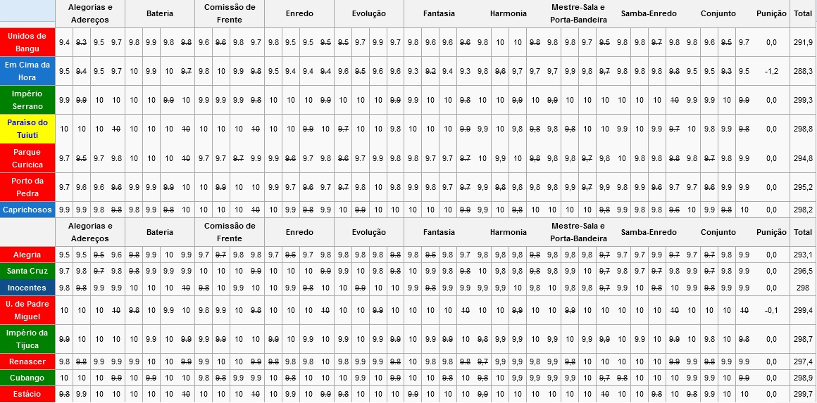 Resultados do Carnaval do Rio - 2015 - Acesso